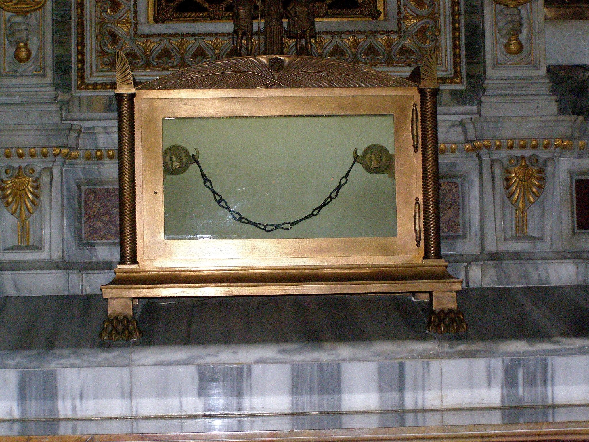 Bazilika svätého Pavla za hradbami. Reťaze, ktorými bol spútaný sv. Pavol